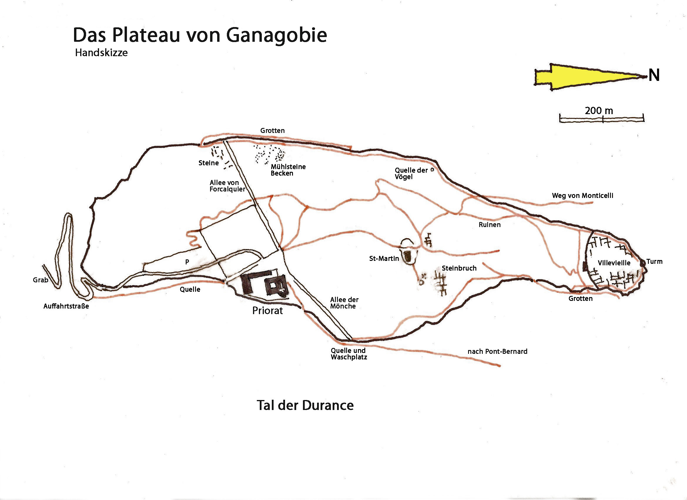 Plateau von Ganagobie, Handskizze